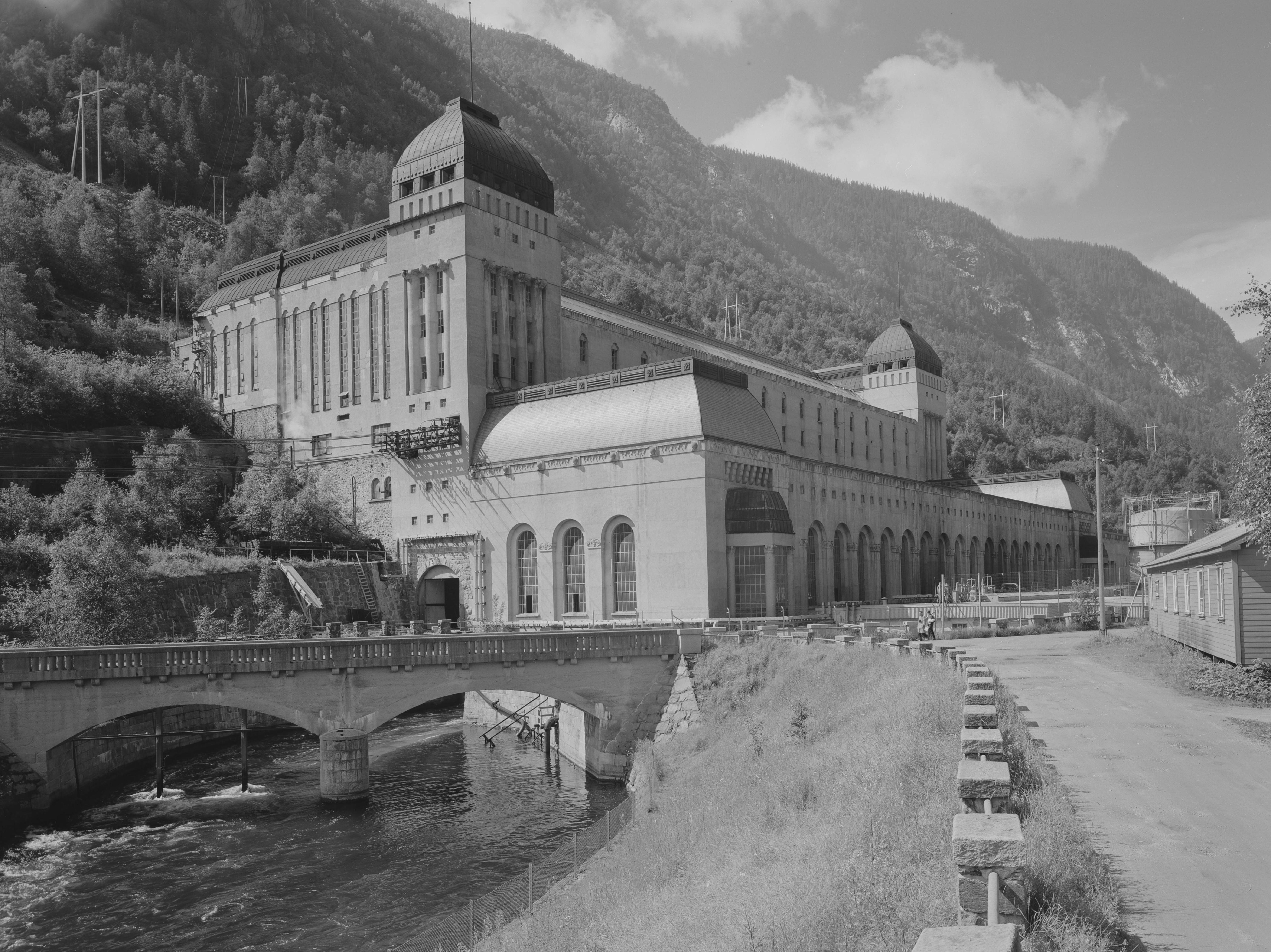 Bildet er hentet fra Nasjonalbibliotekets bildesamling Rjukan,Såheim,Vestfjorddalen, Tinn, Telemark